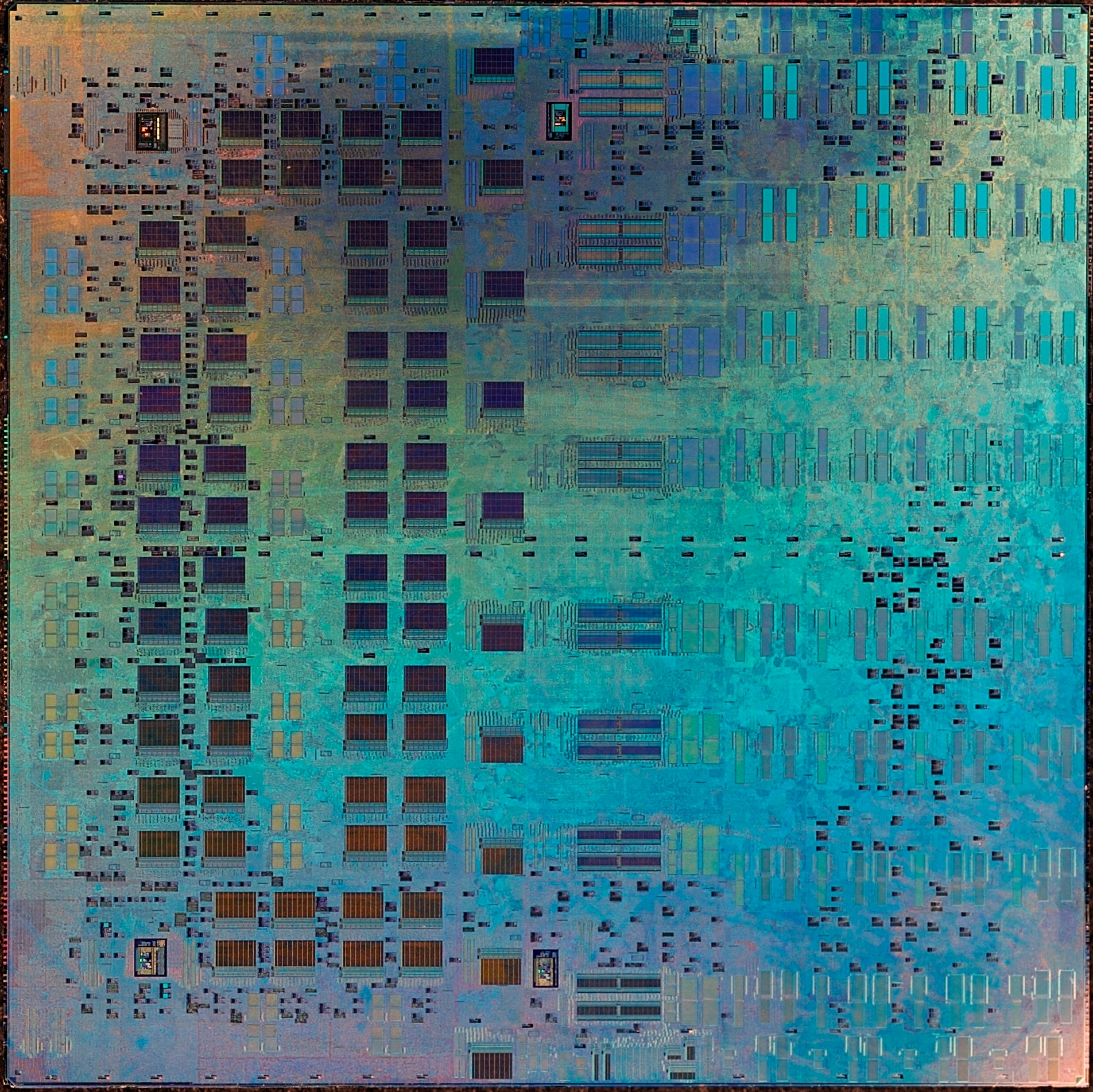 Layout des TRIPS-Prozessor Prototypen